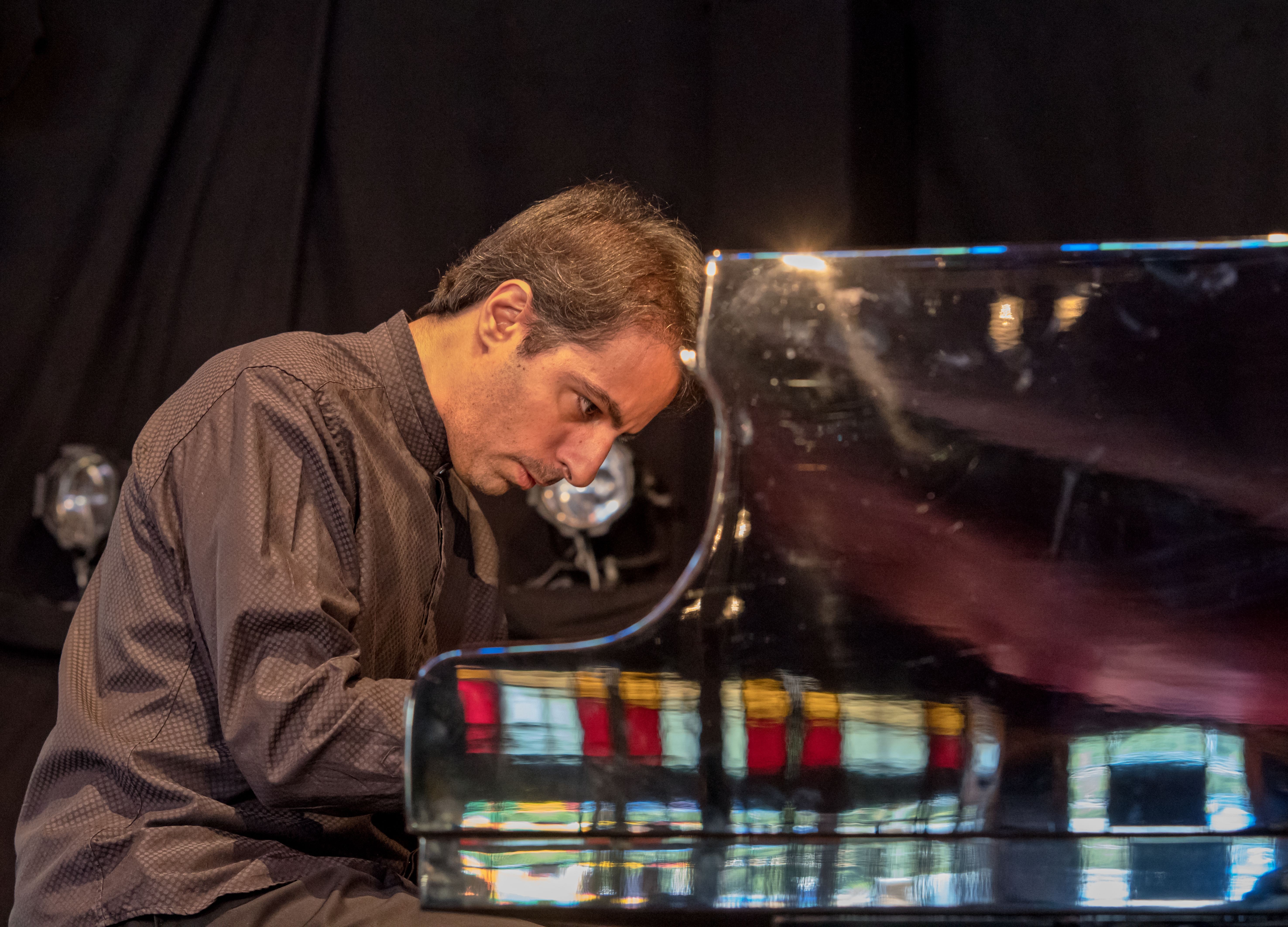 Bilder vom Zelt Musik Festival 2016 in Freiburg im Breisgau Der Pianist Saleem Abboud Ashkar